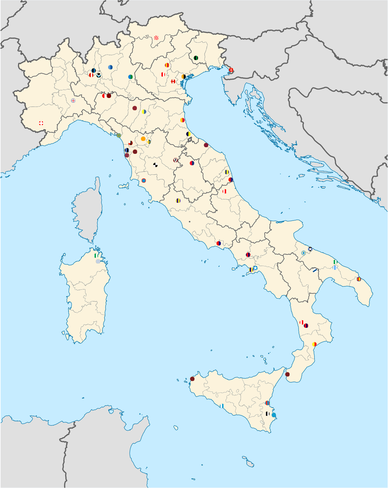 Le 57 squadre della stagione 2017-2018 di Serie C